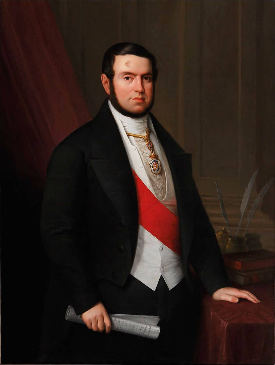 Retrato del politico, jurista y escritor español Joaquín Francisco Pacheco (1808-1865), que llegó a ser presidente del Consejo de Ministros en 1847, durante el reinado de Isabel II y solo durante cinco meses, y también embajador en Roma, fiscal del Tribunal Supremo y miembro de la Real Academia Española, de la Real Academia de la Historia, de la Real Academia de Ciencias Morales y Políticas y de la Real Academia de Bellas Artes de San Fernando.